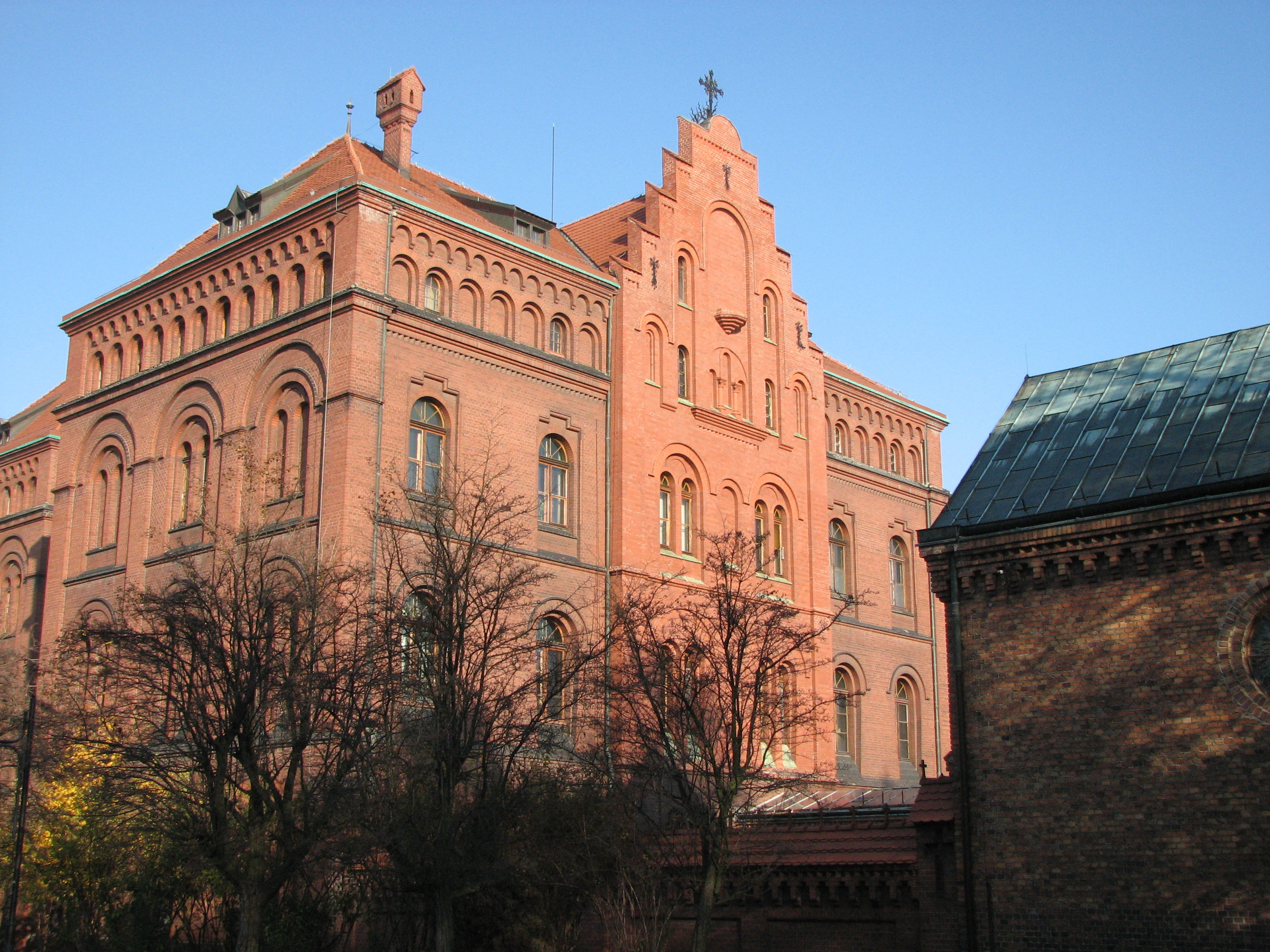 Franciscan monastery in Katowice Panewniki, Poland.